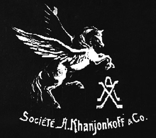 Заставка фильмов киноателье Ханжонкова